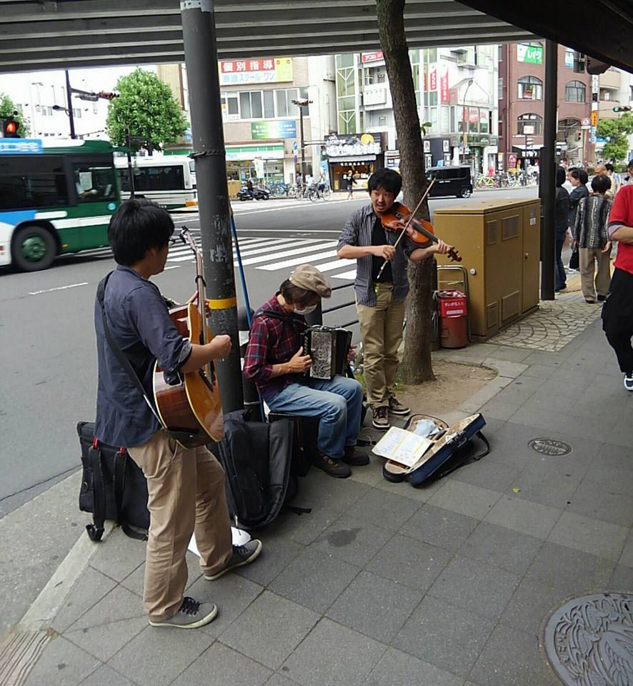 伊丹まちなかバルと同時開催される伊丹オトラクな一日での演奏風景